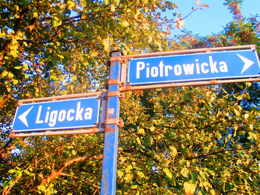 znak ulicy Piotrowickiej i ul. Ligockiej na moście kolejowym